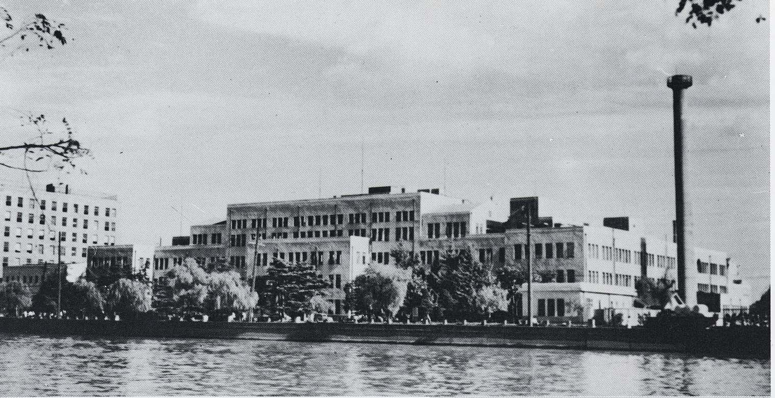 大阪帝国大学本館（中之島・医学部）